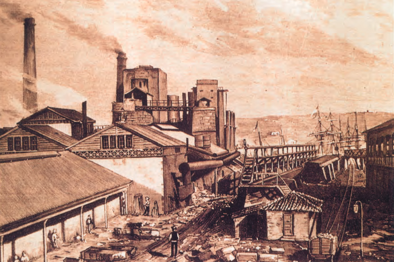 El Carmen labe garaiak